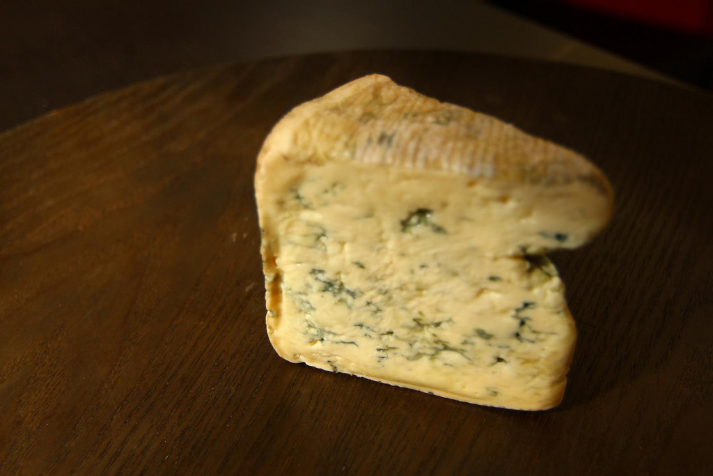 Queso de La Peral, queso asturiano cremoso y relativamente fuerte. Más info: Club del Queso Mumumío.